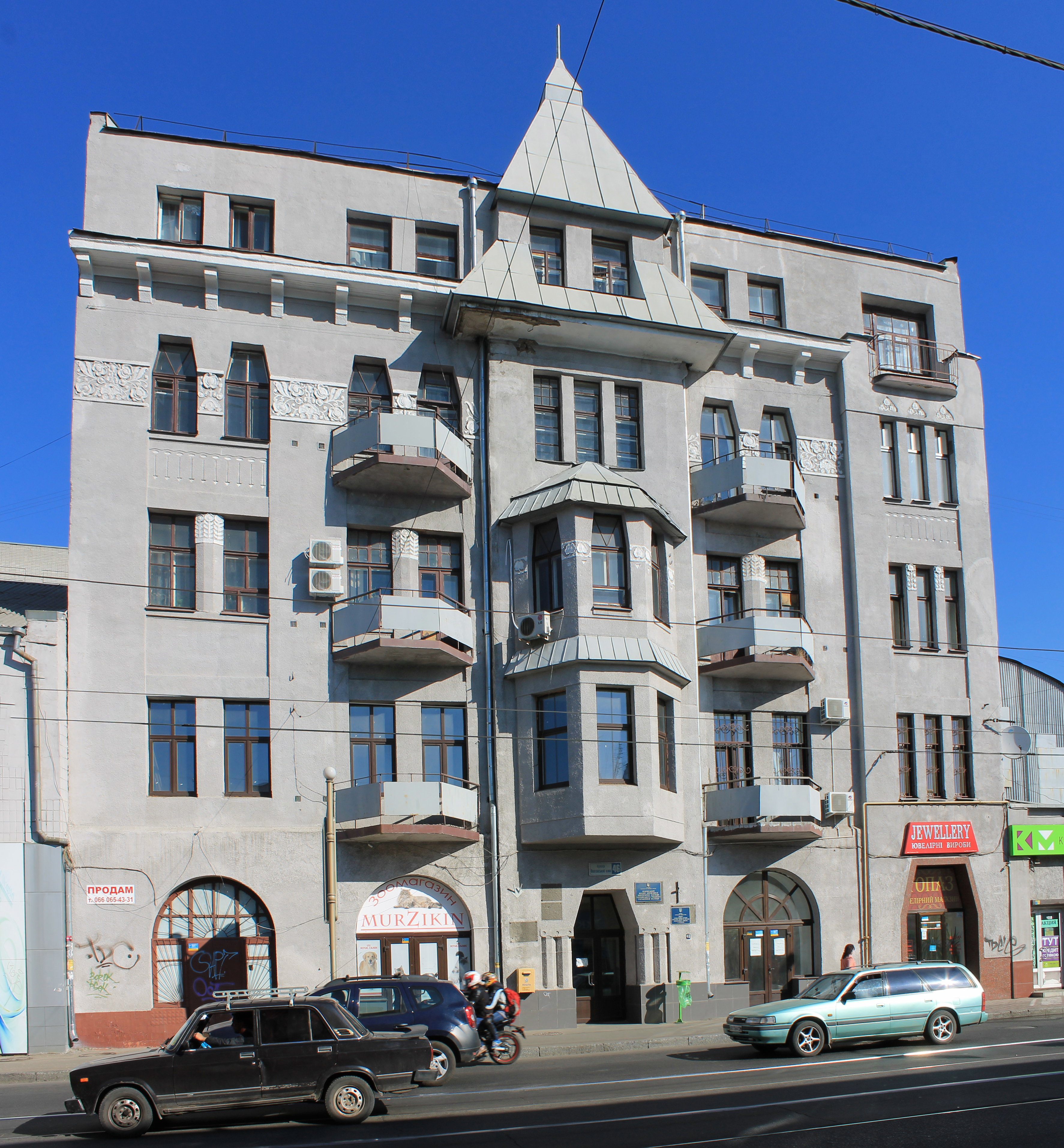 Колишній прибутковий будинок Попова 1912р. Автор проекту - цивільний інженер С.П.Тимошенко. Сучасна адреса: вул.Полтавський Шлях, 46, м.Харків.